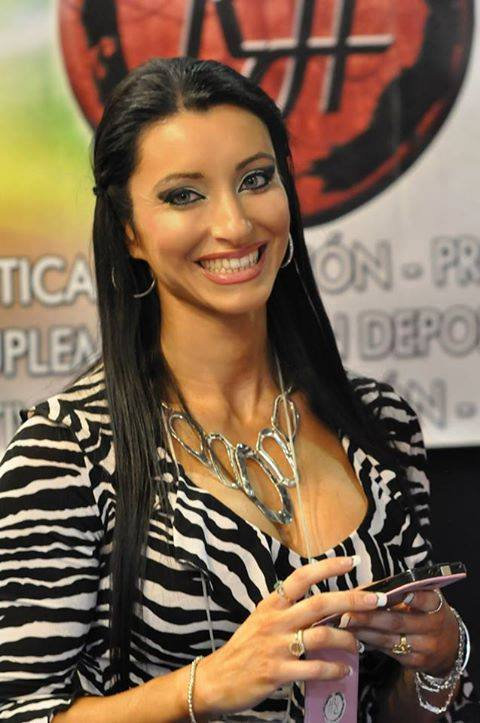 Raquel Hernández Olmo en el stand RH Nutrition del Arnold Europe